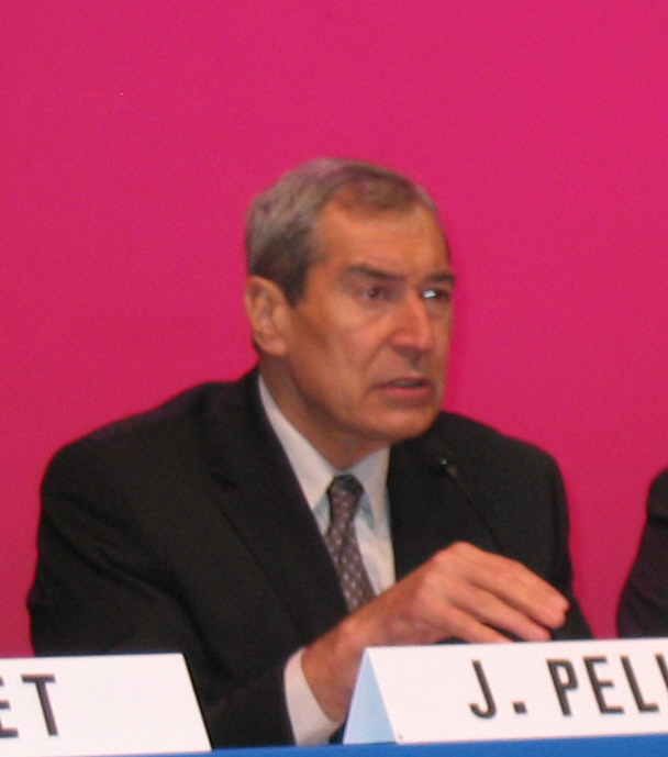 Jacques Pélissard, maire de Lons-le-Saunier (39), Président de l'Association des Maires de France (AMF). Je suis l'auteur du cliché pris en novembre 2005 au 79ème Congrès de l'AMF.